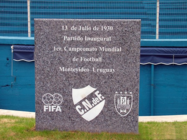 Estadio Gran Parque Central, Montevideo, Uruguay. Placa colocada por la FIFA en 2005 conmemorando la celebración en este estadio de uno de los primeros partidos de la historia de los mundiales de fútbol.Otro se jugaba el en el estadio de peñarol "field de los pocitos"